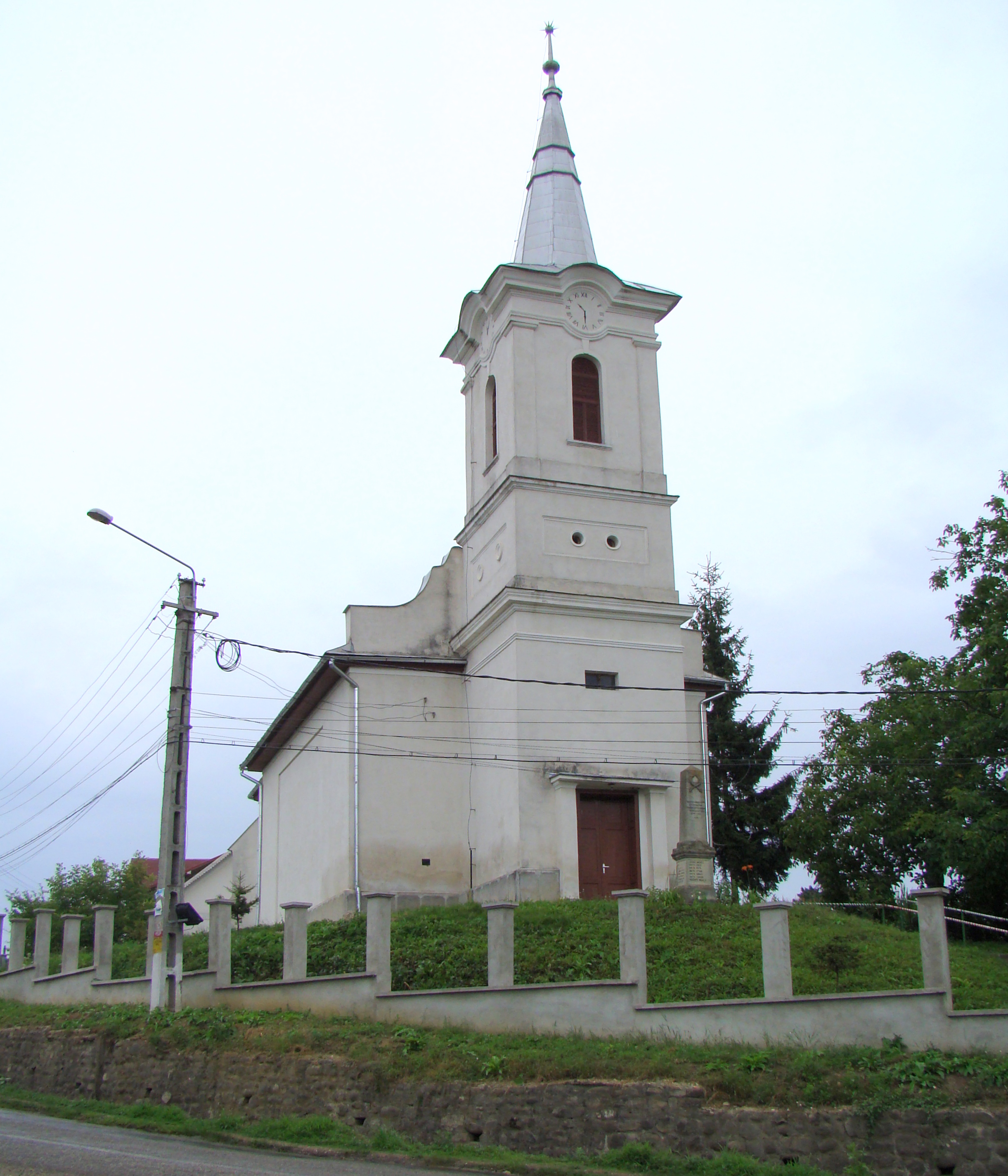 Calvinist church in Uriu (Felőr) village, Bistrița-Năsăud county, Romania